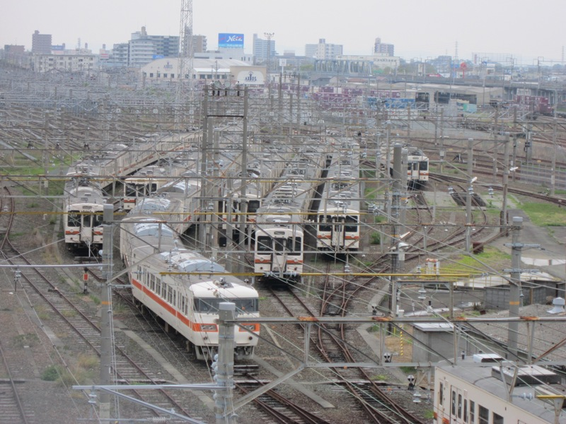 廃車前提留置中の117系と119系車両